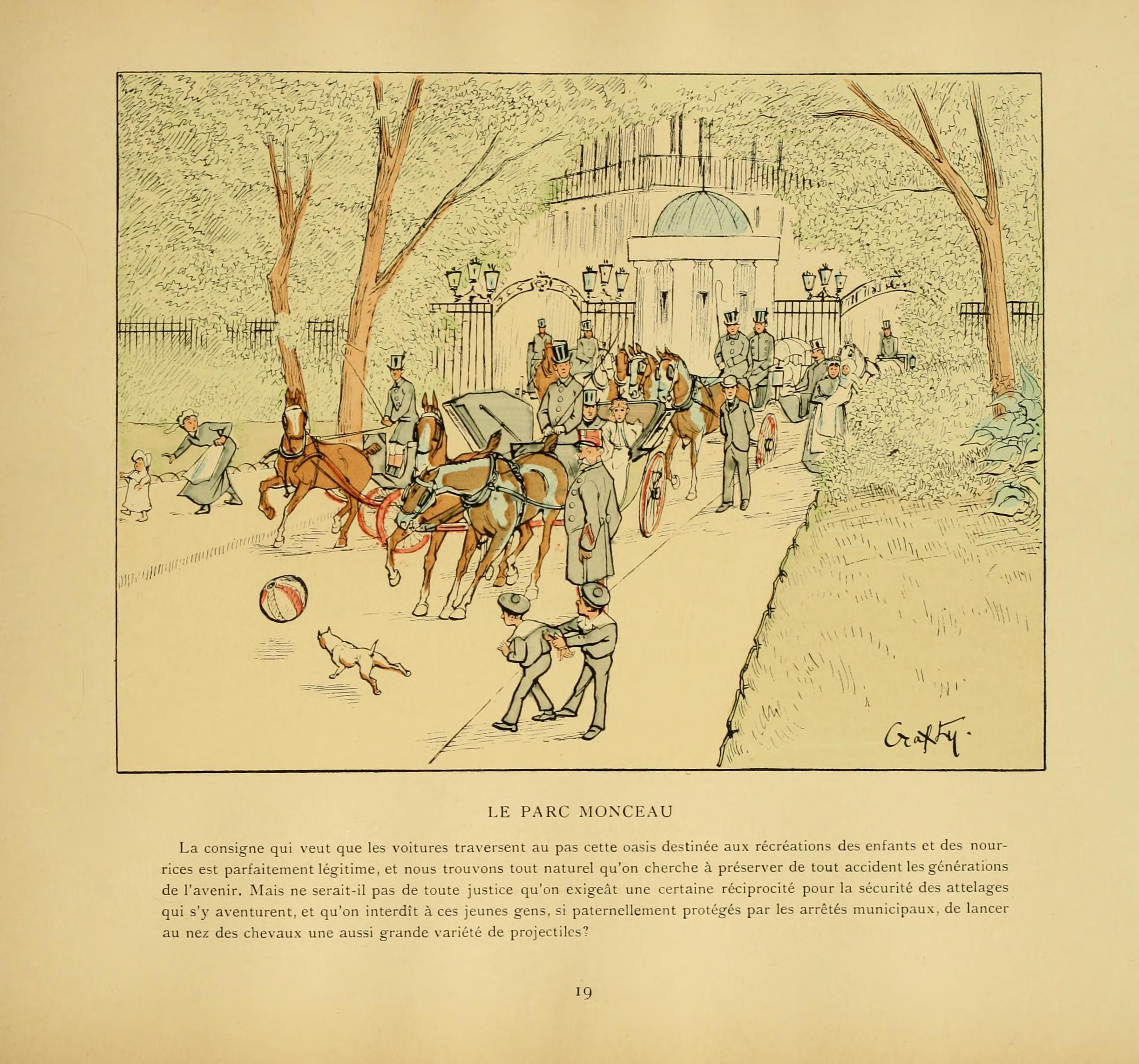 A travers Paris / Texte et dessins par Crafty [pseud.].